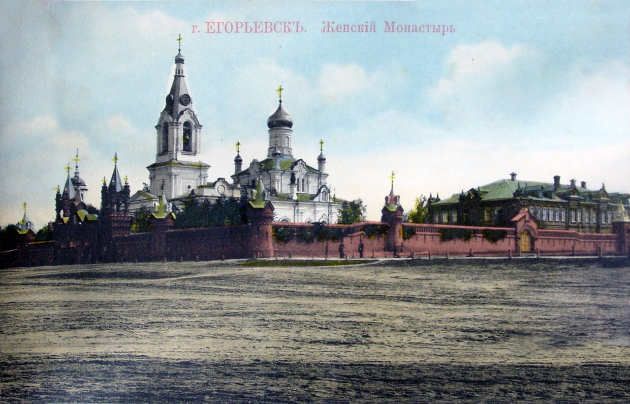 Свято-Троицкий девичий Мариинский монастырь